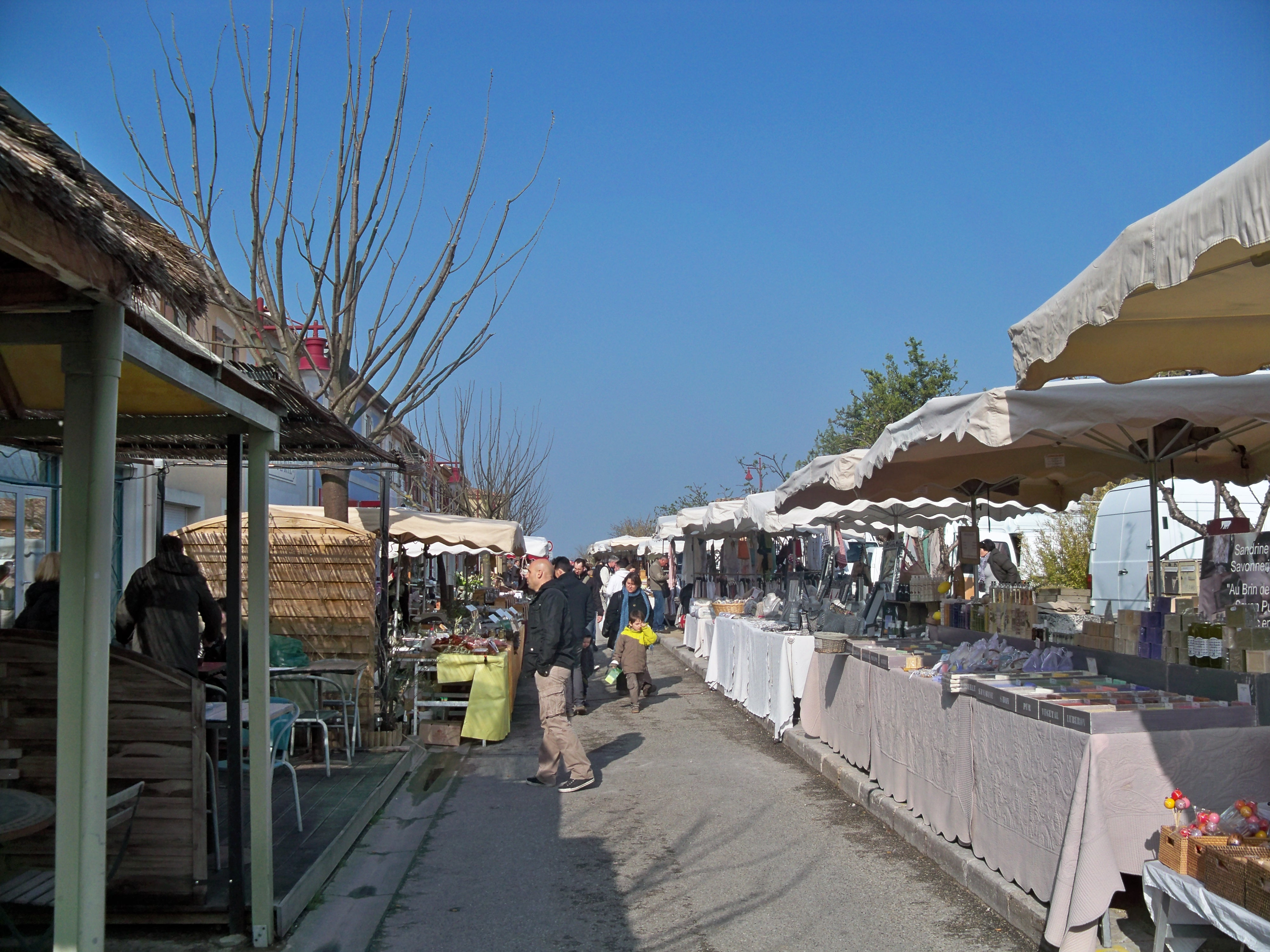 marché de Coustellet (84)